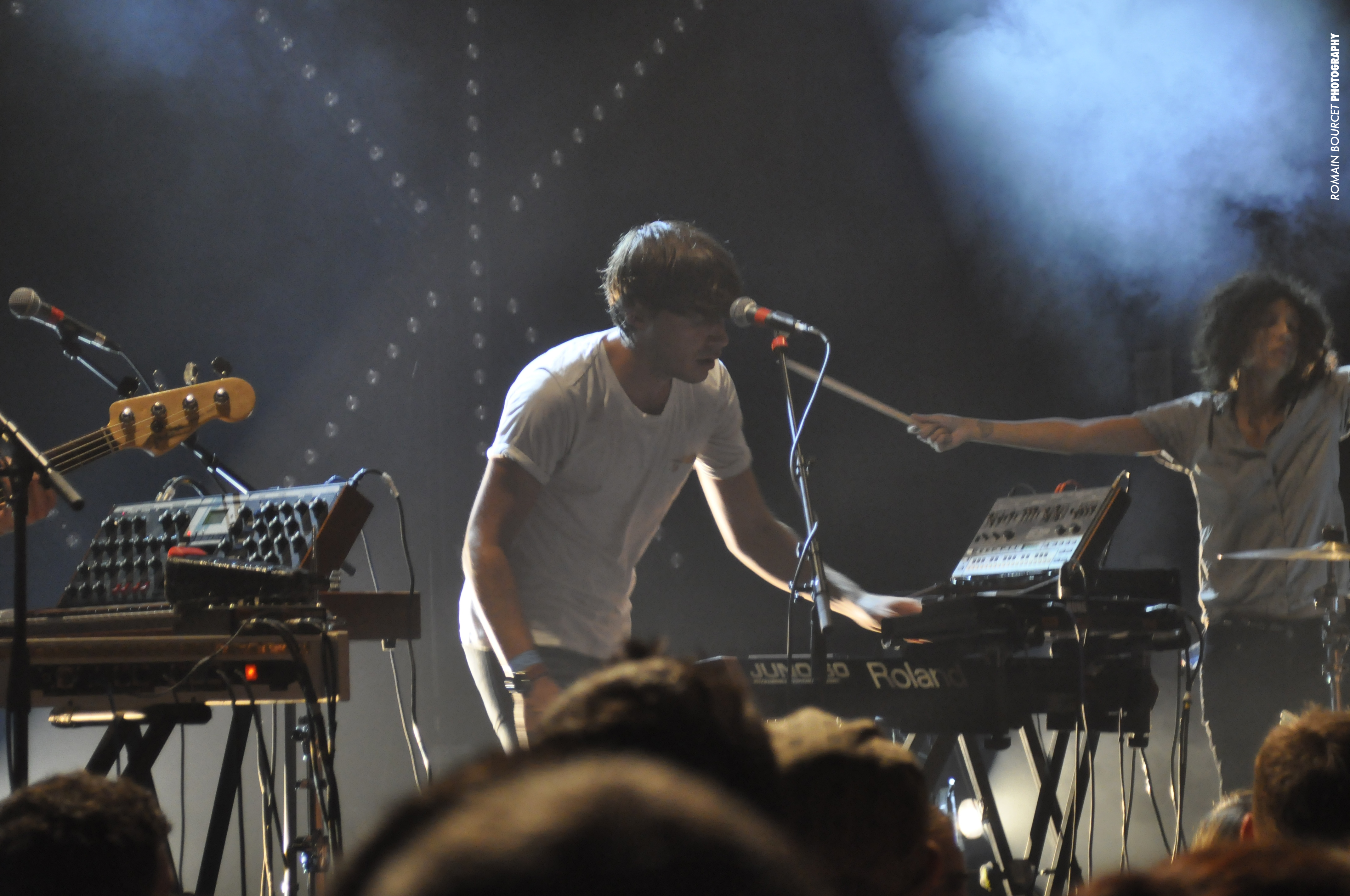 Yuksek - Le Moloco - Audincourt - 21 septembre 2012